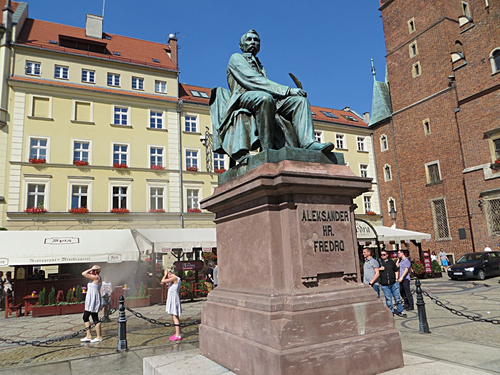 Aleksander-Fredro